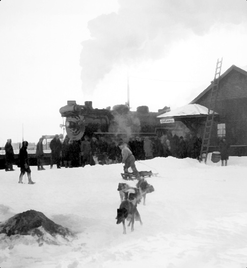 Titre Winter transportation in the northland - Gogama Station, Ontario. Numéro d'identification 02628 Ampleur 1 BW Negative(s) date [ca. 1931] Portée et contenu Railway Stations Description physique 1 Nitrate 4" x 5" Créateur N/A Emplacement Gogama, Ontario, Canada Géolocalisation N/A Nom de la collection CN Images of Canada Collection Mots clés Winter transportation in the northland - Gogama Station, Ontario. Winter Transportation at Gogama Station Transportation d'hiver à la gare de Gogama Railway Stations Gogama, Ontario, Canada [ca. 1931] Stations, Dogs, Gares, Chiens CN Images of Canada Collection Notes générales N/A Droits et autorisations Public domain. CC0 Emplacement dans les rayons N/A